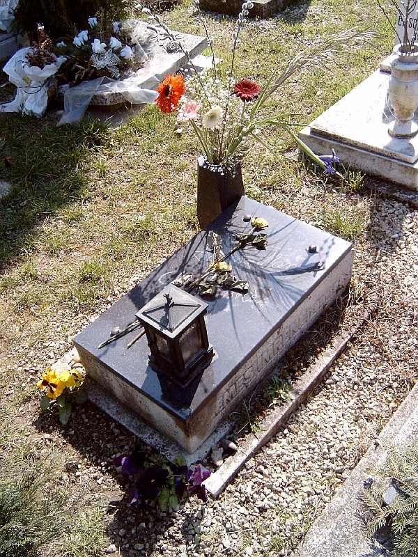 Szemes Mari (Sasvár, 1932. máj. 7.–Bp., 1988. dec. 10.) színésznő sírja Budapesten. Óbudai temető: 13/5-I-121.